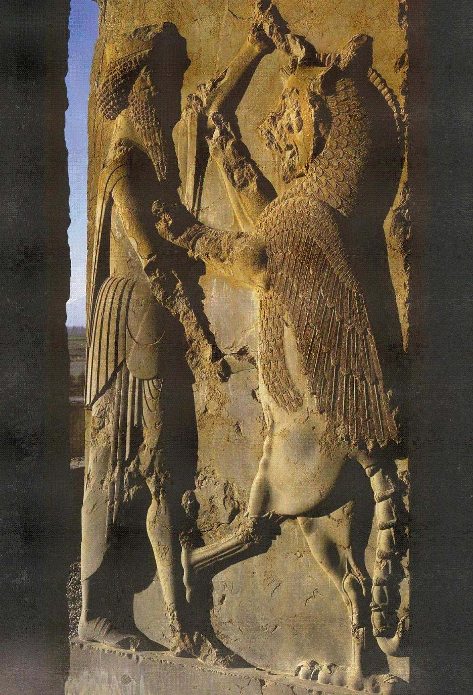 نگاره سنگی تقابل شهریار (شاه هخامنشی) و شیر در یکی از ورودی های تخت جمشید